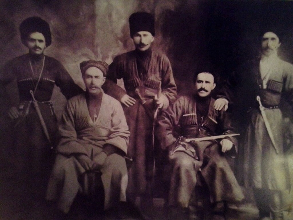 Орстхойские абреки из селения Сагопши, сидящий справа БиргIа Ахьмад(Мержо), уточняем остальных.